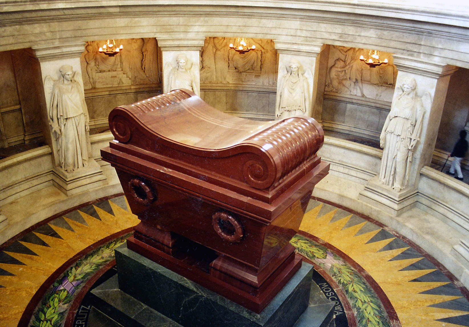 Sarkophag Napoleons I. in der Krypta des Invalidendoms in Paris